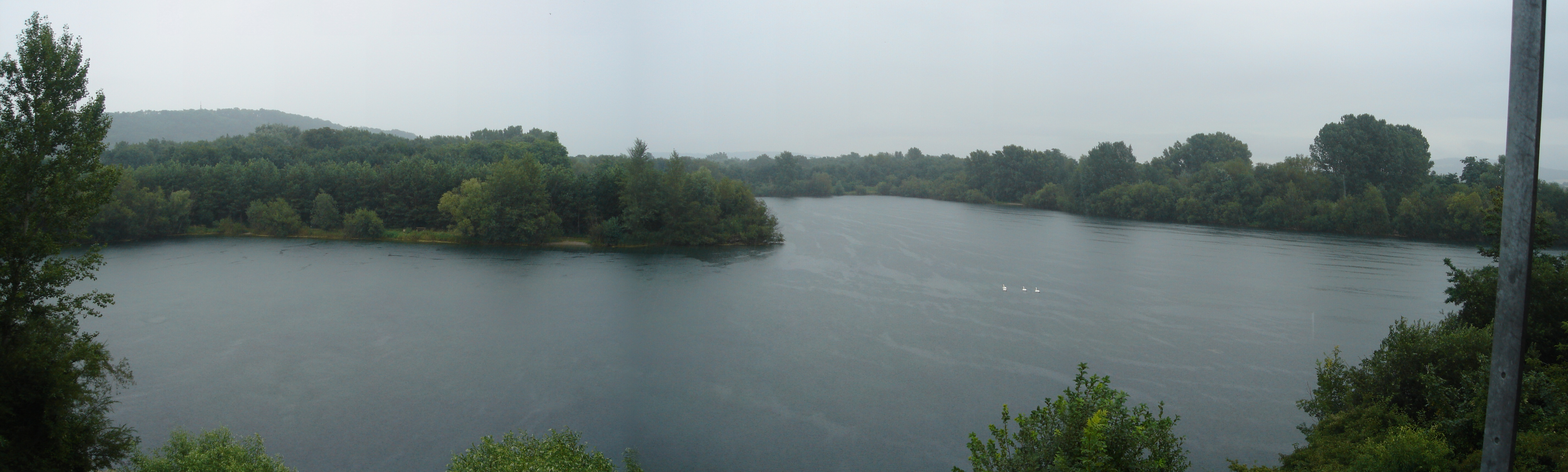 Panorama kleiner Viehofner See vom Aussichtsturm aus gesehen